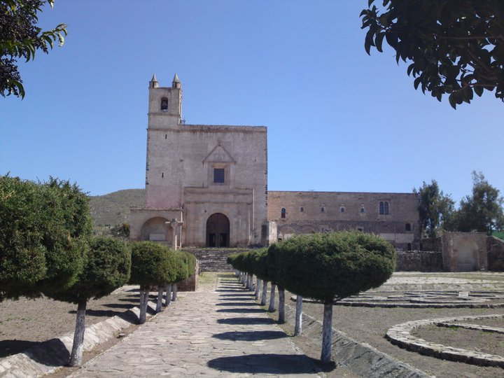 Parroquia de San Andrés Apóstol (Epazoyucan)